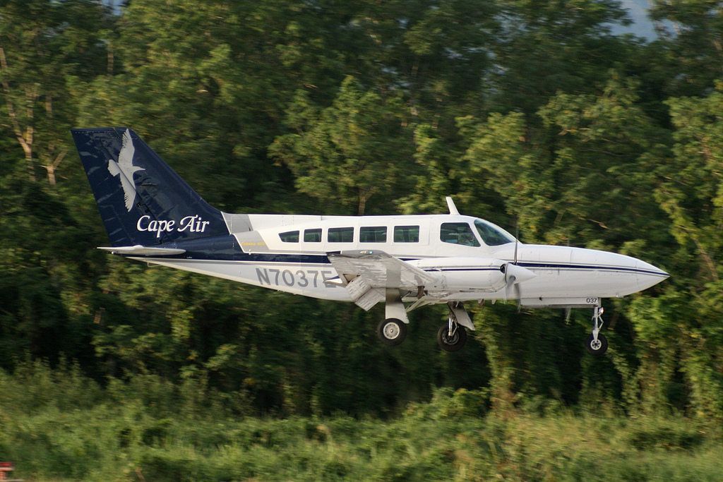 A Cape Air Cessna 402 at Eugenio María de Hostos Airport in Puerto Rico.